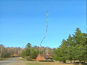 Démolition de la tour de Notre-Dame-du-Mont-Carmel, avril 2001.